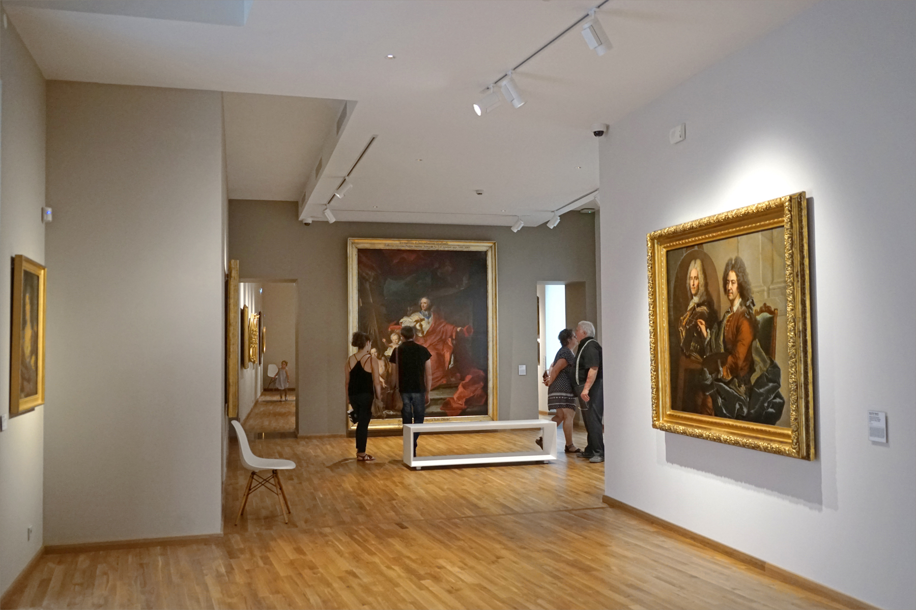 Salles du Perpignan baroque À droite, Autoportrait avec François Castanier, oeuvre de Hyancinthe Rigaud, 1730, huile sur toile Le musée d'Art Hyacinthe-Rigaud vient de rouvrir à Perpignan après trois ans de travaux. Il occupe deux hôtels particuliers construits au XVIIè siècle, situés dans le vieux Perpignan : l'hôtel de Lazerme et l'hôtel de Mailly. Ils ont été reliés entre eux pour aménager les nouveaux espaces d'exposition. Les collections sont réparties en quatre grands domaines chronologiques appelés : Perpignan gothique, Perpignan baroque, Perpignan moderne et Perpignan aujourd'hui.